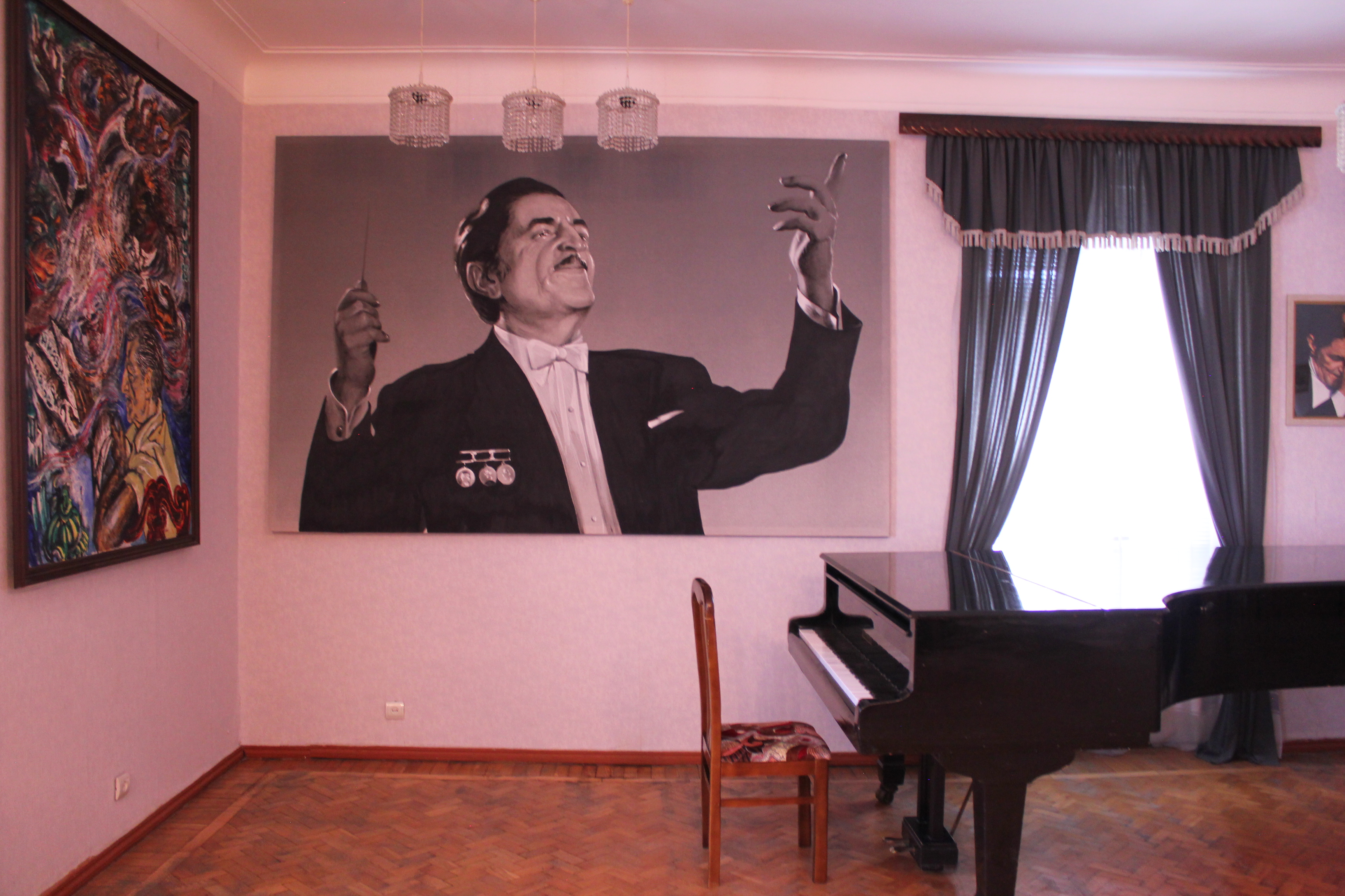 Гостиная комната дома-музея азербайджанского дирижера и композитора Ниязи. На стенах комнаты демонстрируются фотографии, отражающие широкую общественную деятельность Ниязи, произведения изобразительного искусства и другие предметы, подаренные семье в разные годы.